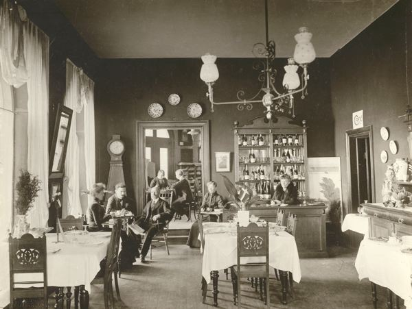 Fotografi föreställande caféinteriör, Tysta Marie eller Tysta Maria. Personerna från vänster: Froyk, artist Nils Selander, Palmqvist (fader till Nanny Palmqvist), fröken Hjertstrand, i fonden, ingeniör Froyk och agent Olofsson, en kort tid innehavare.